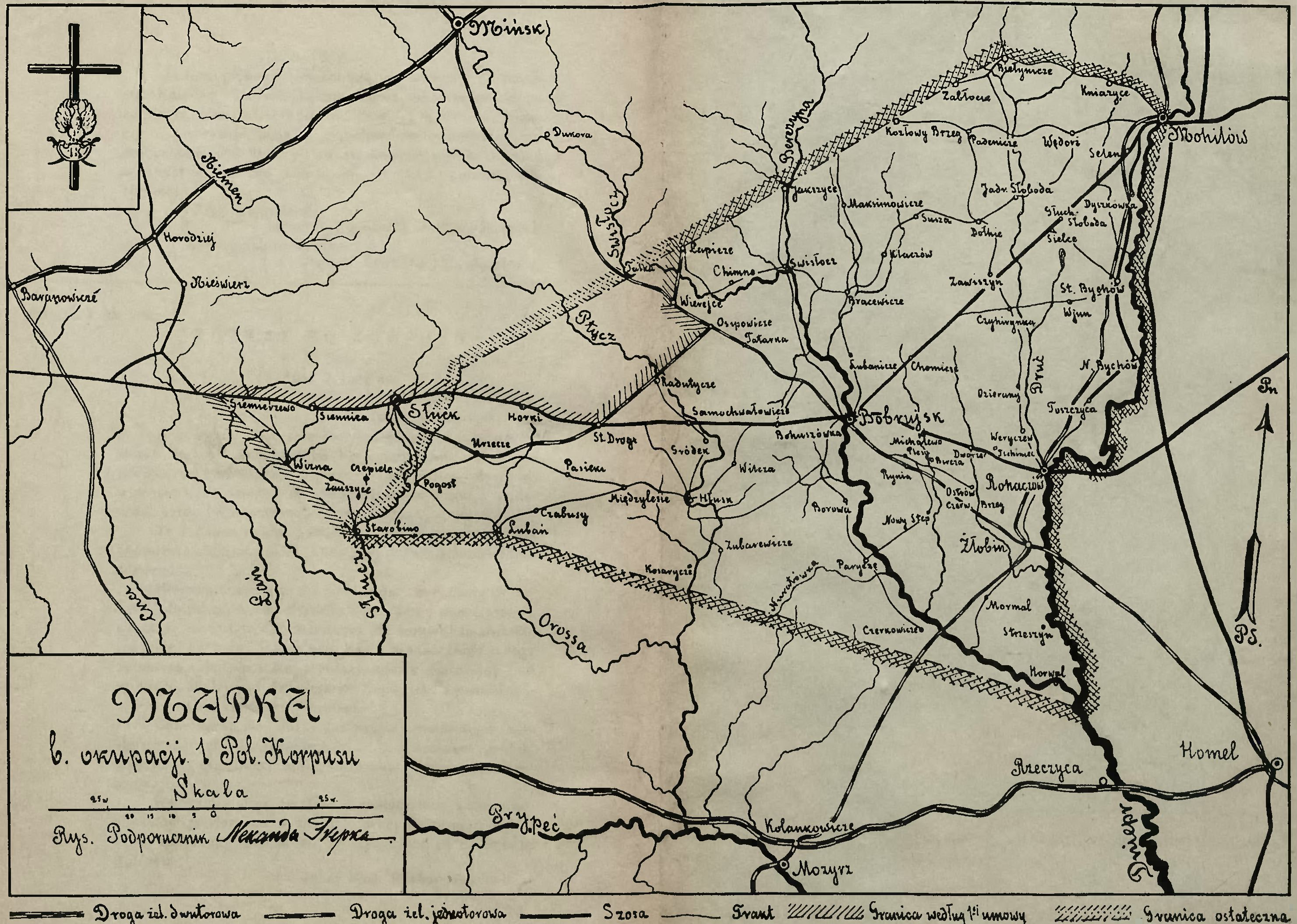 "Polska Dowborowa" - obszar zajmowany przez I Korpus Polski gen. Józefa Dowbor-Muśnickiego w 1918 roku (luty-lipiec). Mapka z książki "Krótki szkic do historji I-go Polskiego Korpusu" (wyd. 1919) Józefa Dowbor-Muśnickiego.